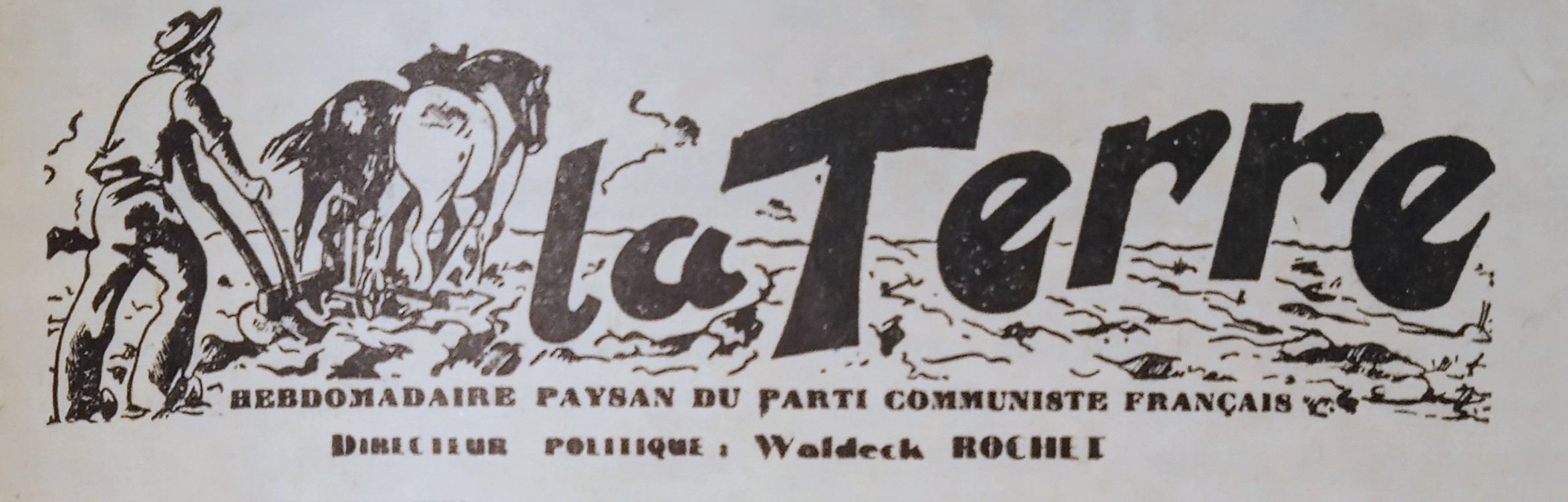 Créé par lui en 1937, le journal La Terre est dirigé par Waldeck Rochet pendant toute la Quatrième République.